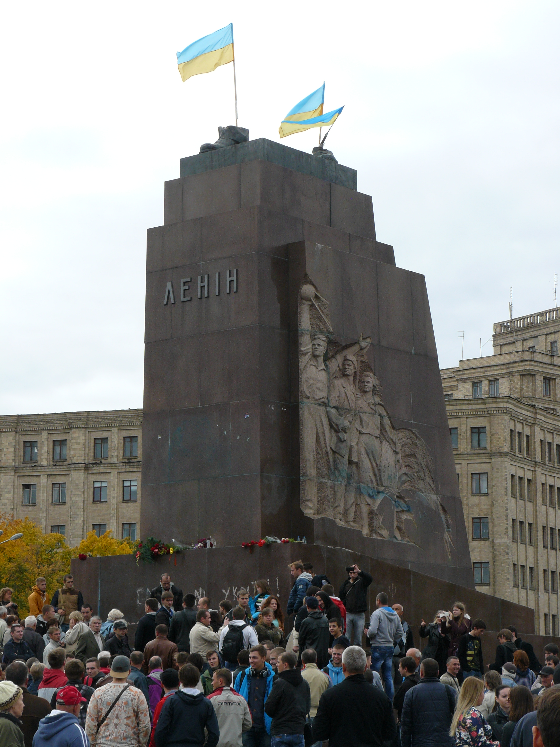 Пустой пьедистал на слежующий день после разрушения памятника Ленину в Харькове